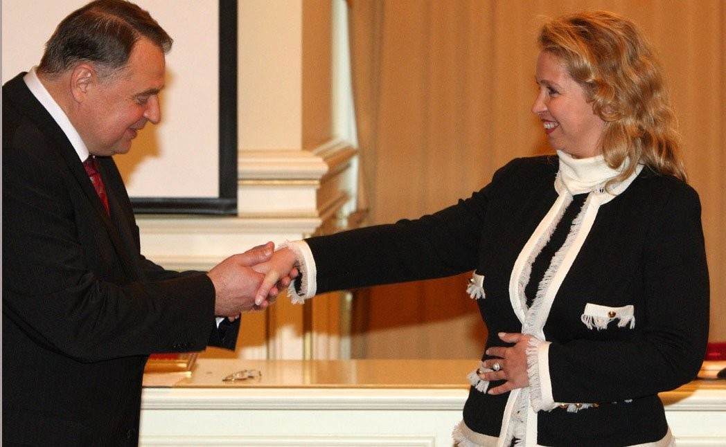 Юрий Шевченко